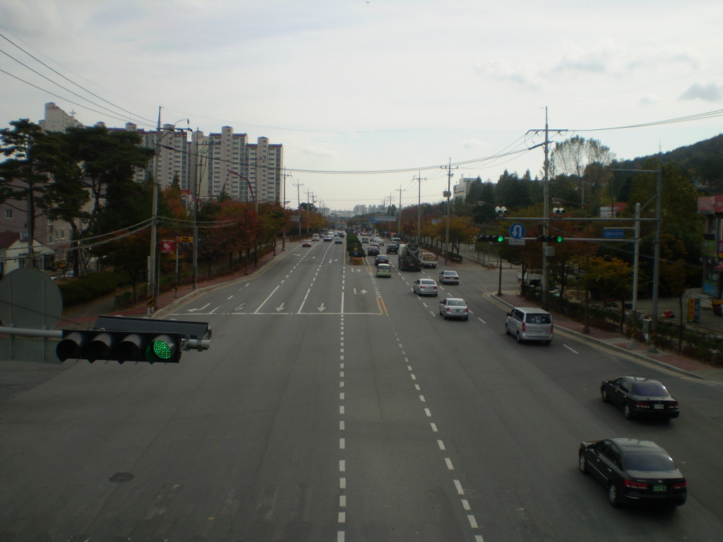 부영6차아파트 버스정류장 인근 육교에서 본 국도 58호선